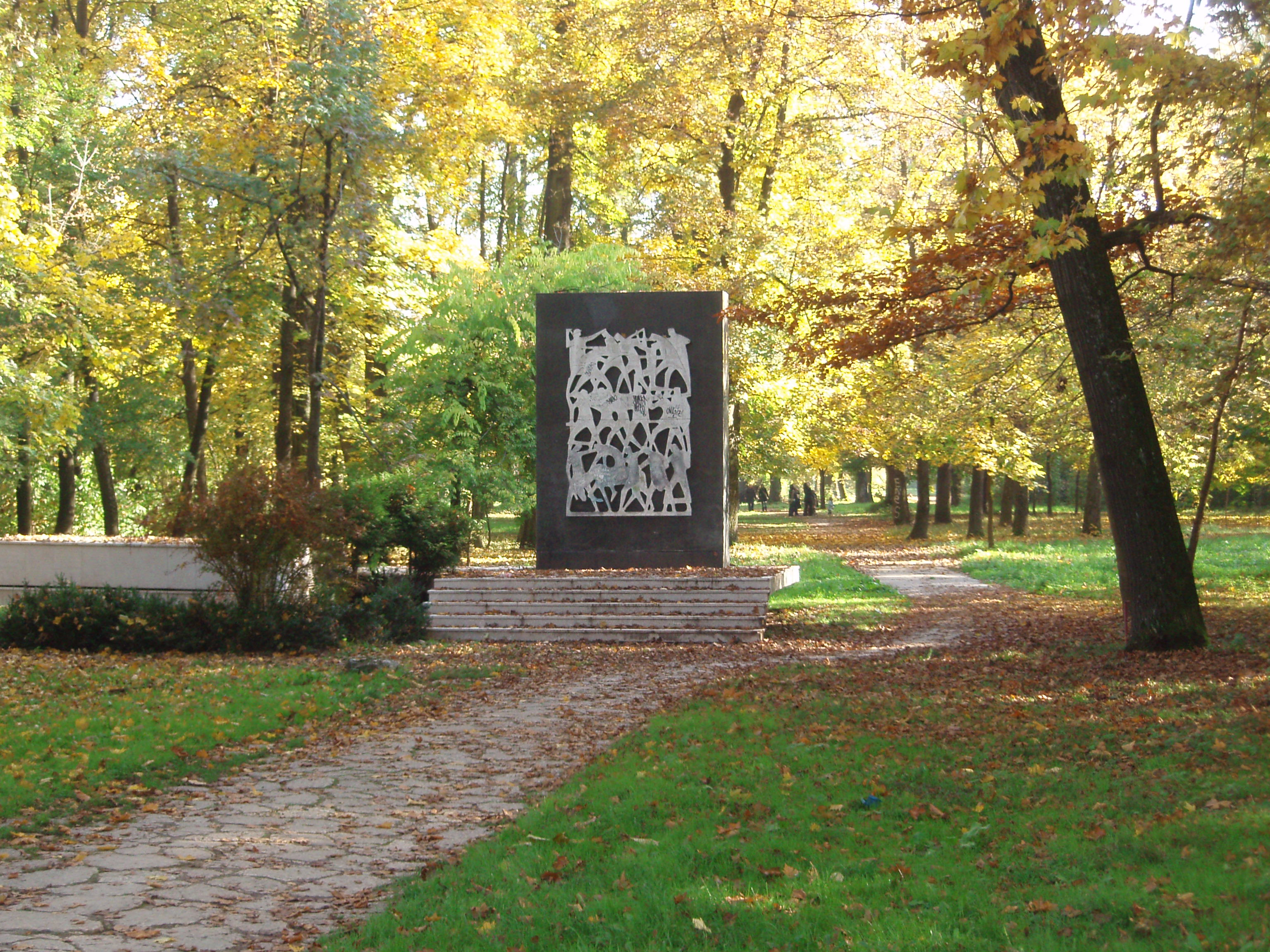 Ilidža